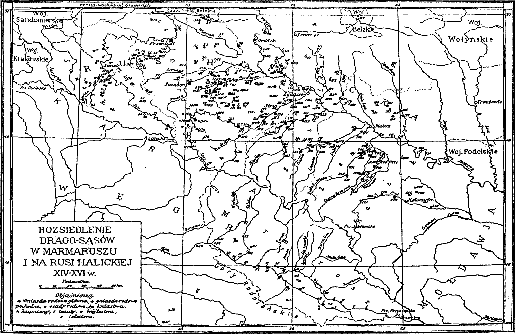 Raspandirea familiei Drag-Sasu in Galitia